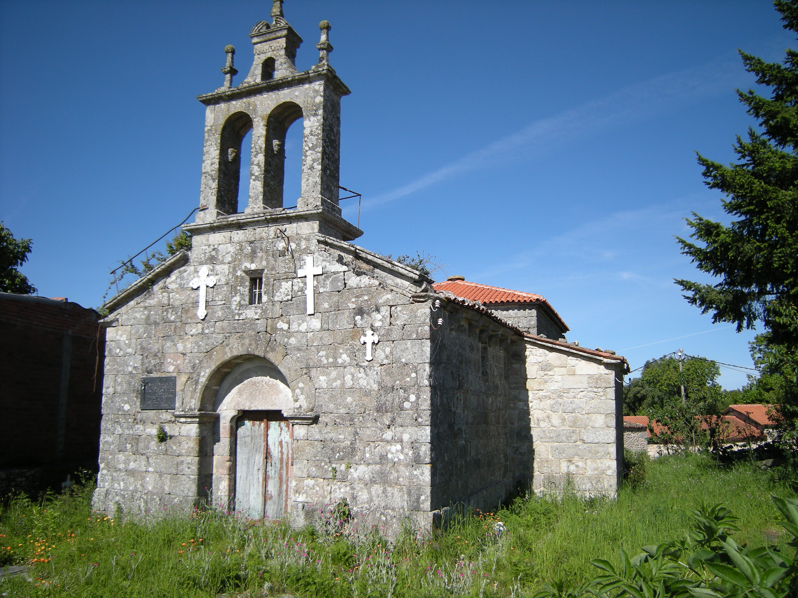 Igrexa parroquial de San Xoán de Antas de Ulla, no concello de Antas de Ulla